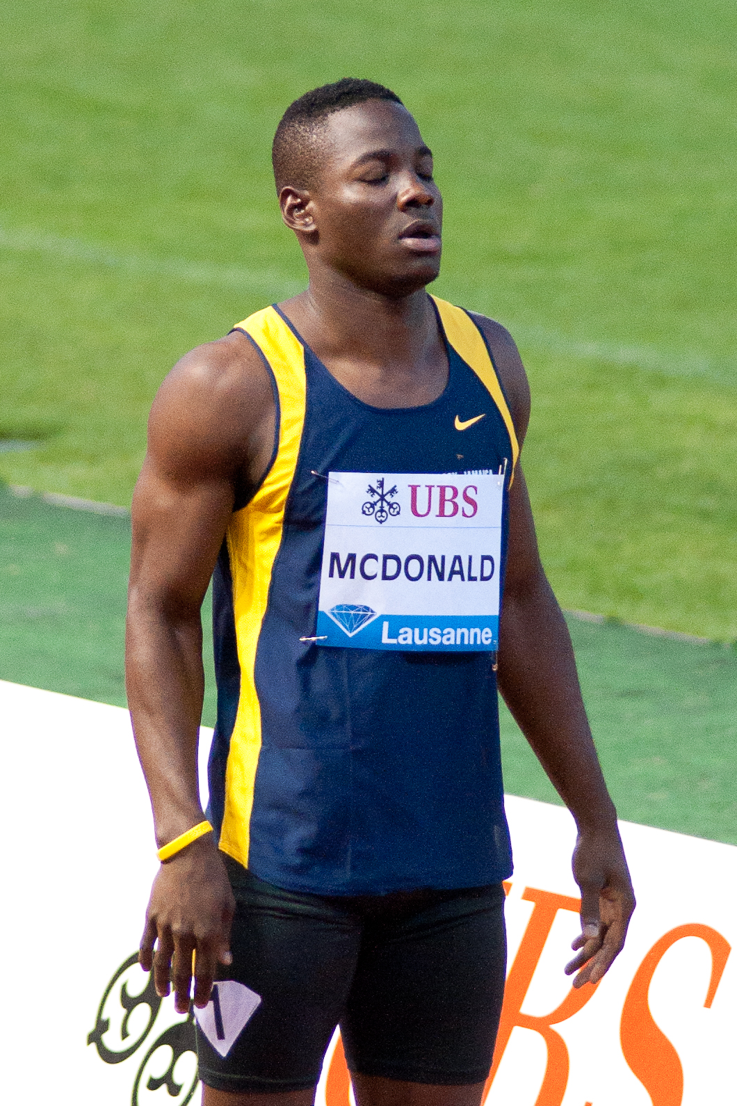 Athletissima 2012 - Rusheen Mc Donald